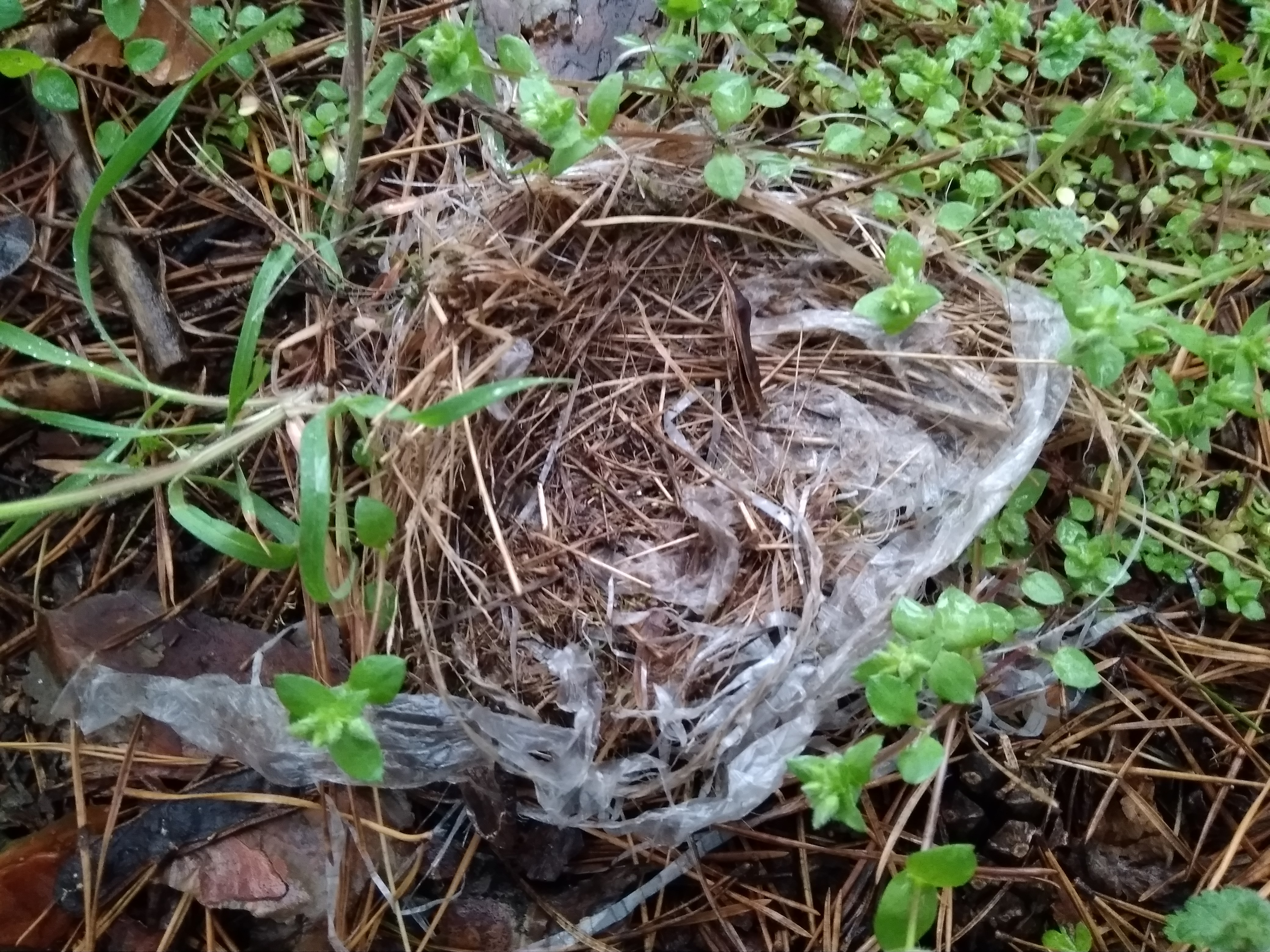 Знято у Миколаєві, сосновий ліс